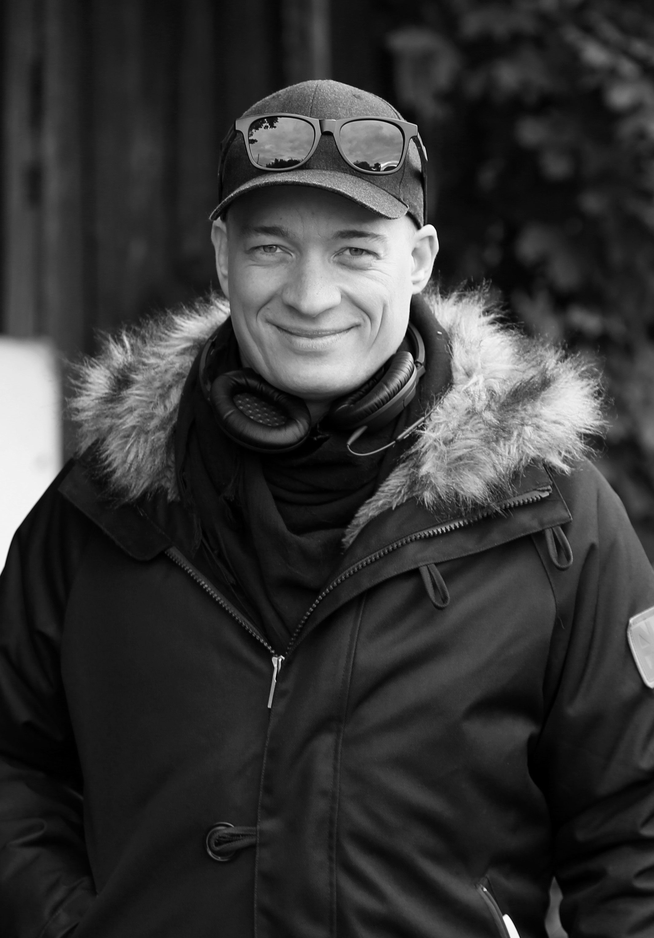 Juuso Syrjä Sorjosen kuvauksissa lokakuussa 2010